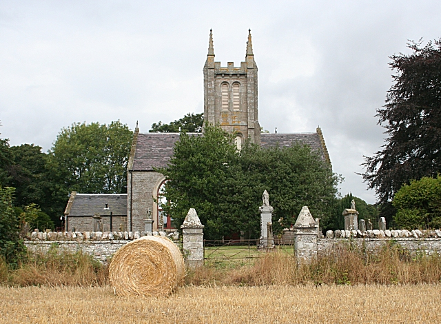 Oathlaw Kirk, Oathlaw, Angus